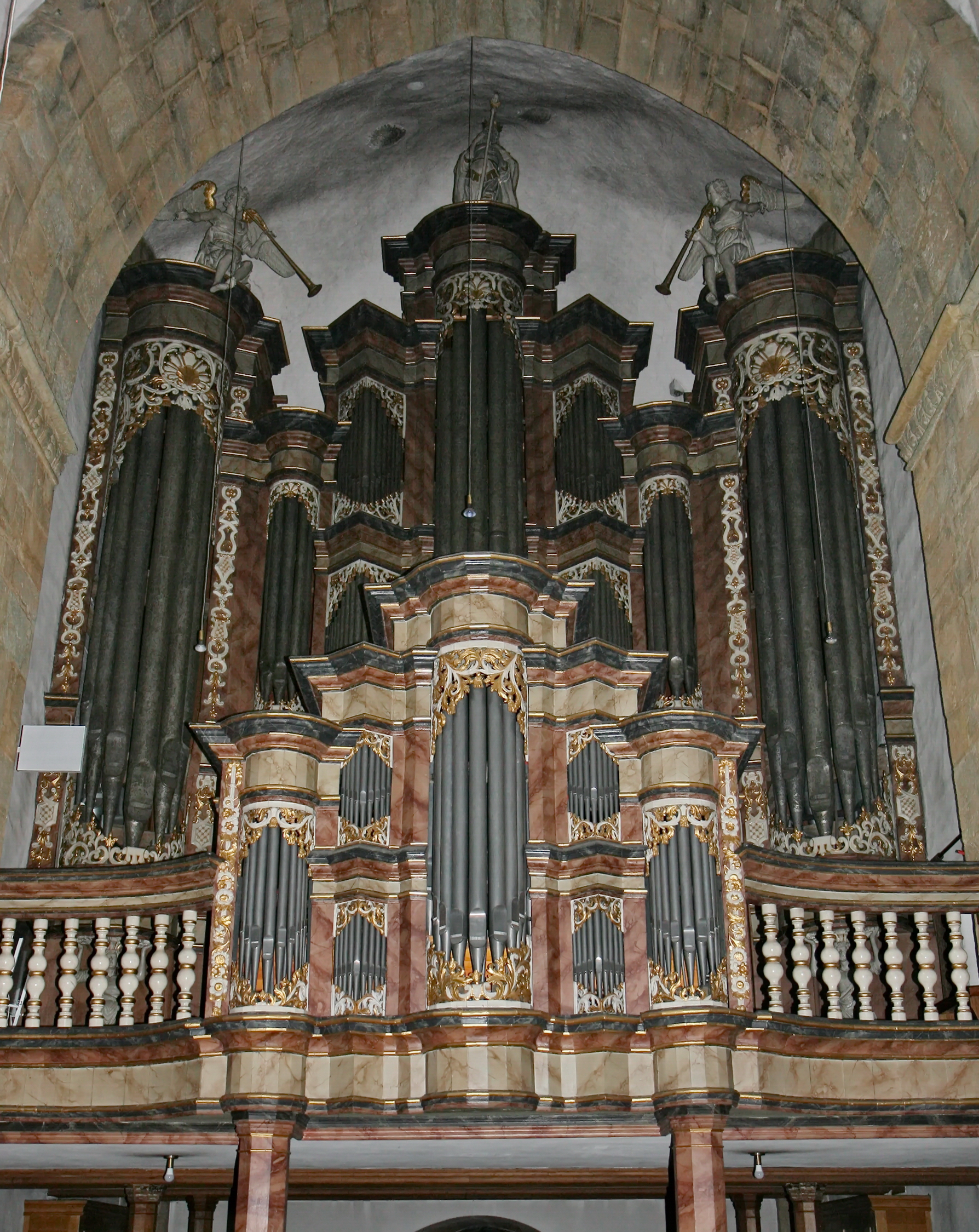 Pfarrkirche St. Nikolaus in Büren, Königstraße 20. This image shows a heritage building in Germany, located in the North Rhine-Westphalian city Büren (Westfalen) (no. 4/8).